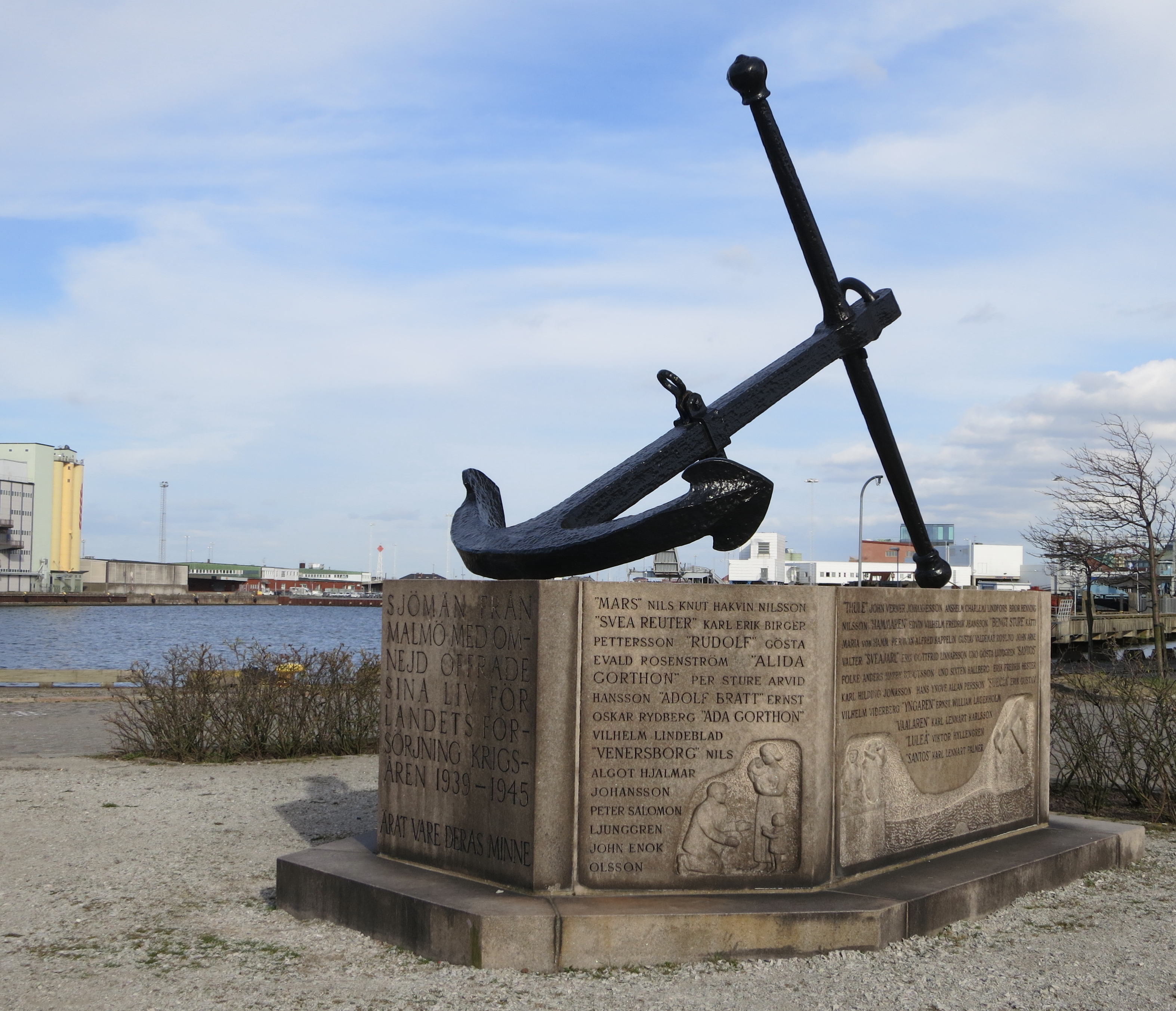 Monument till krigsförlista sjömäns minne av Eiler Graebe och Ivar Ålenius-Björk i Malmö